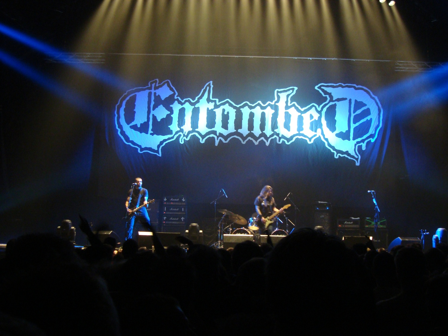 Entombed actuando en directo en noviembre de 2010.